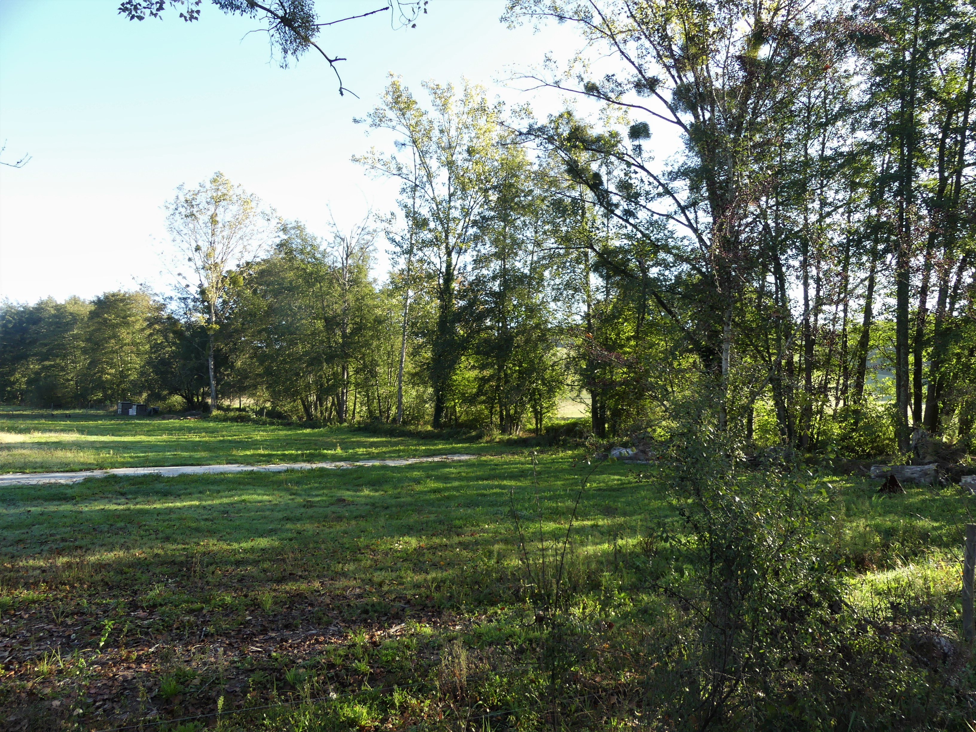 La vallée du ruisseau de Ladoux près du lieu-dit la Ressègue, Sainte-Foy-des-Vignes, Ginestet, Dordogne, France.